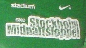 Midnattsloppet 2009 i Stockholm